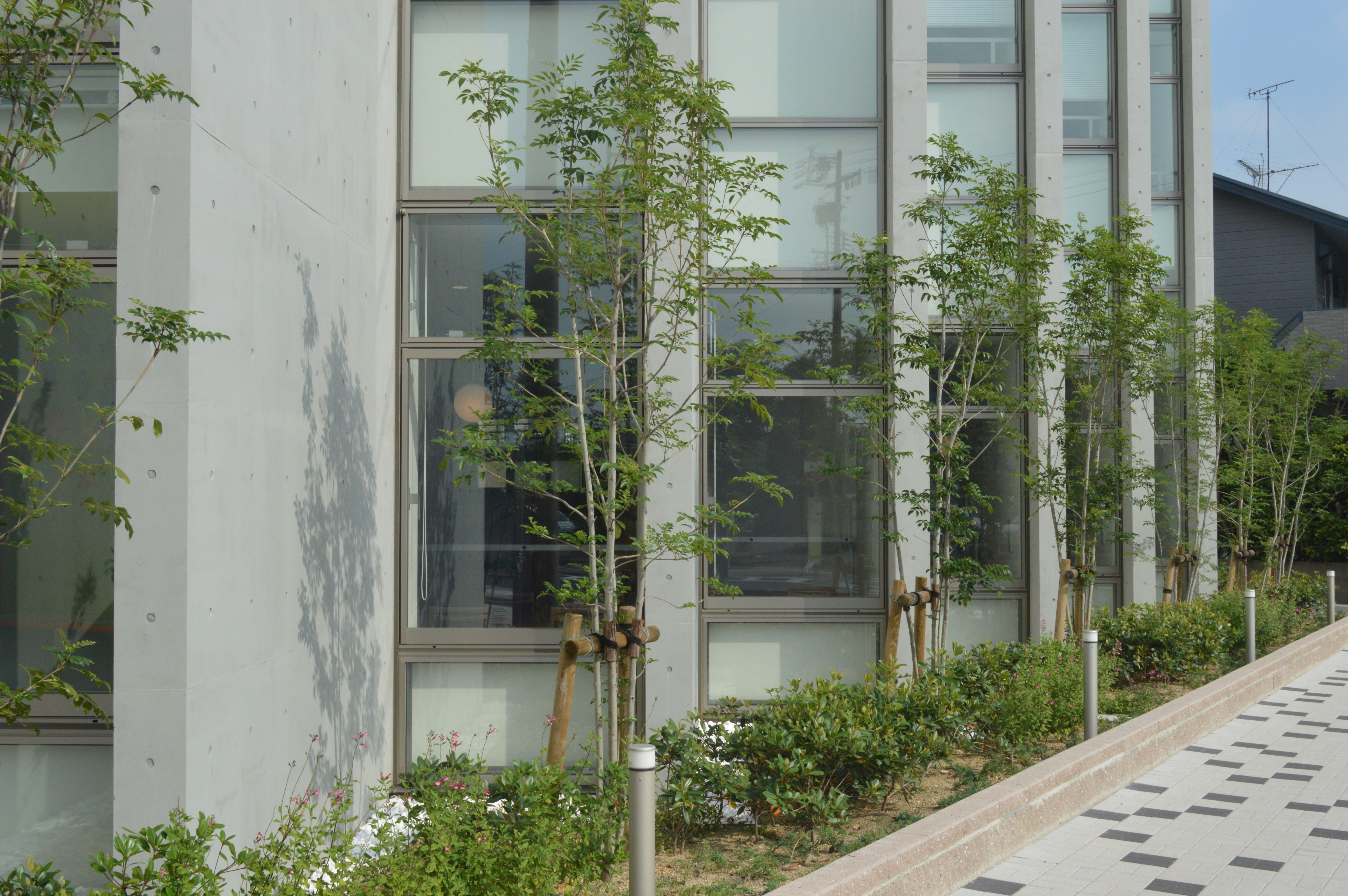 愛知県みよし市にある複合施設、みよし市図書館学習交流プラザ「サンライブ」。みよし市立中央図書館などを内包。